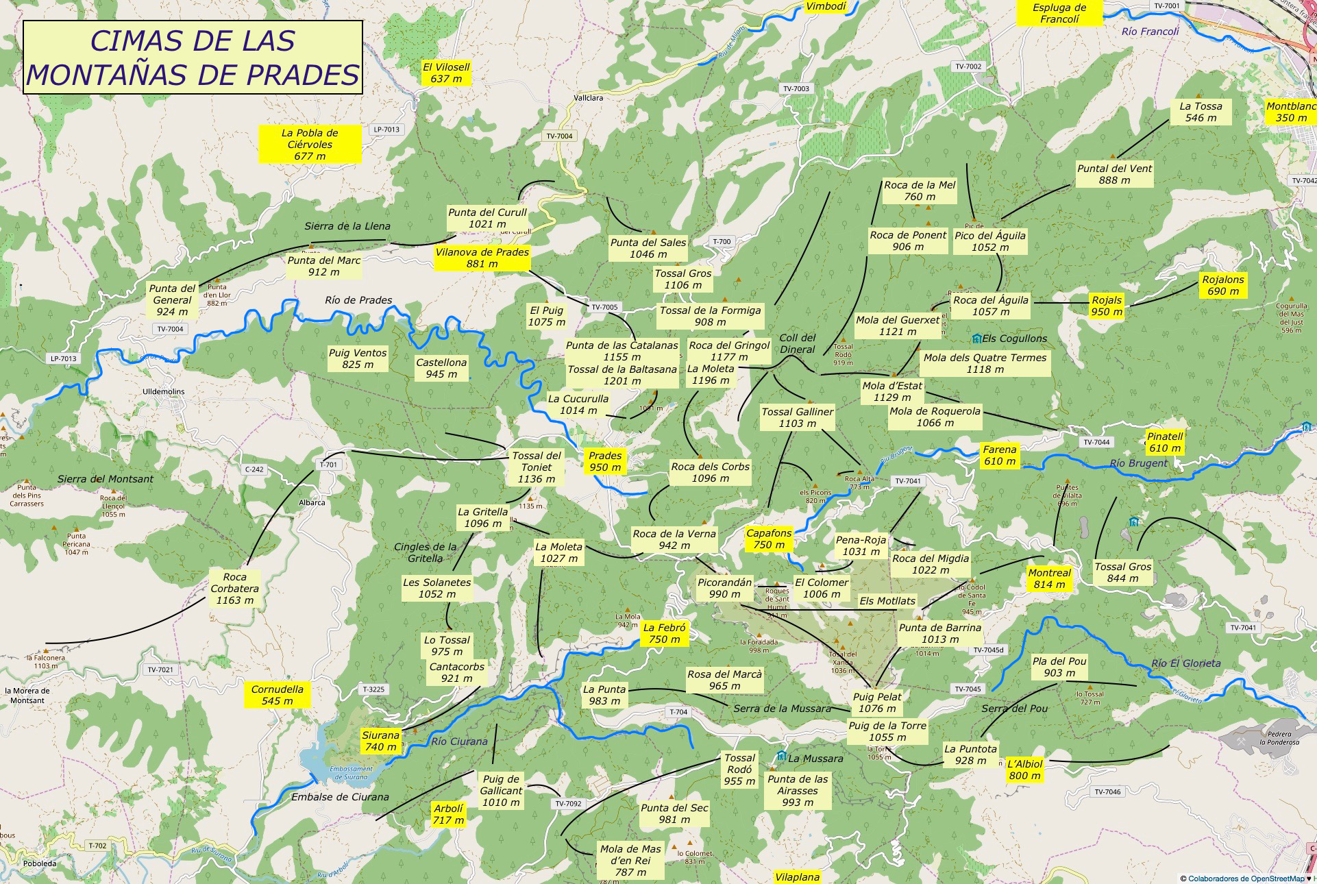 Cimas y carenas de las montañas de Prades